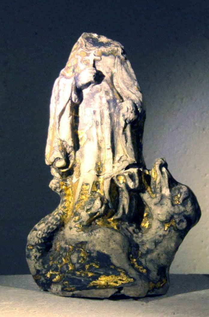 Die kopflose Heilige. Tonfigur aus dem ehemaligen Zisterzienserkloster Ihlow